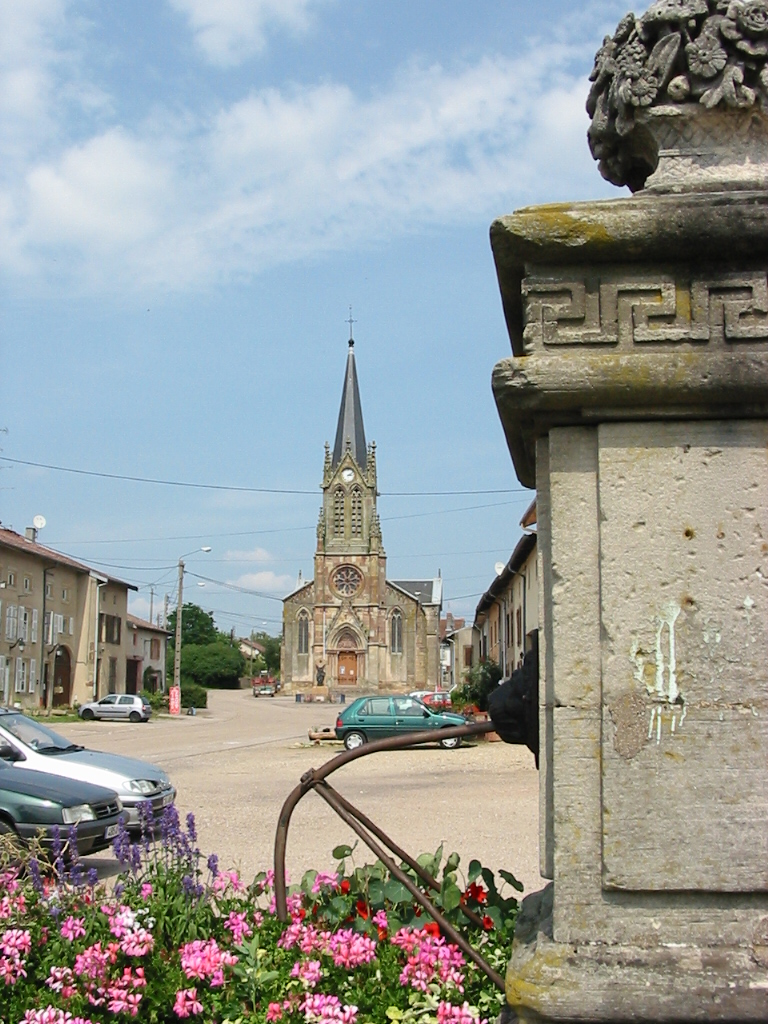 Église de Magnières (Meurthe-et-Moselle)